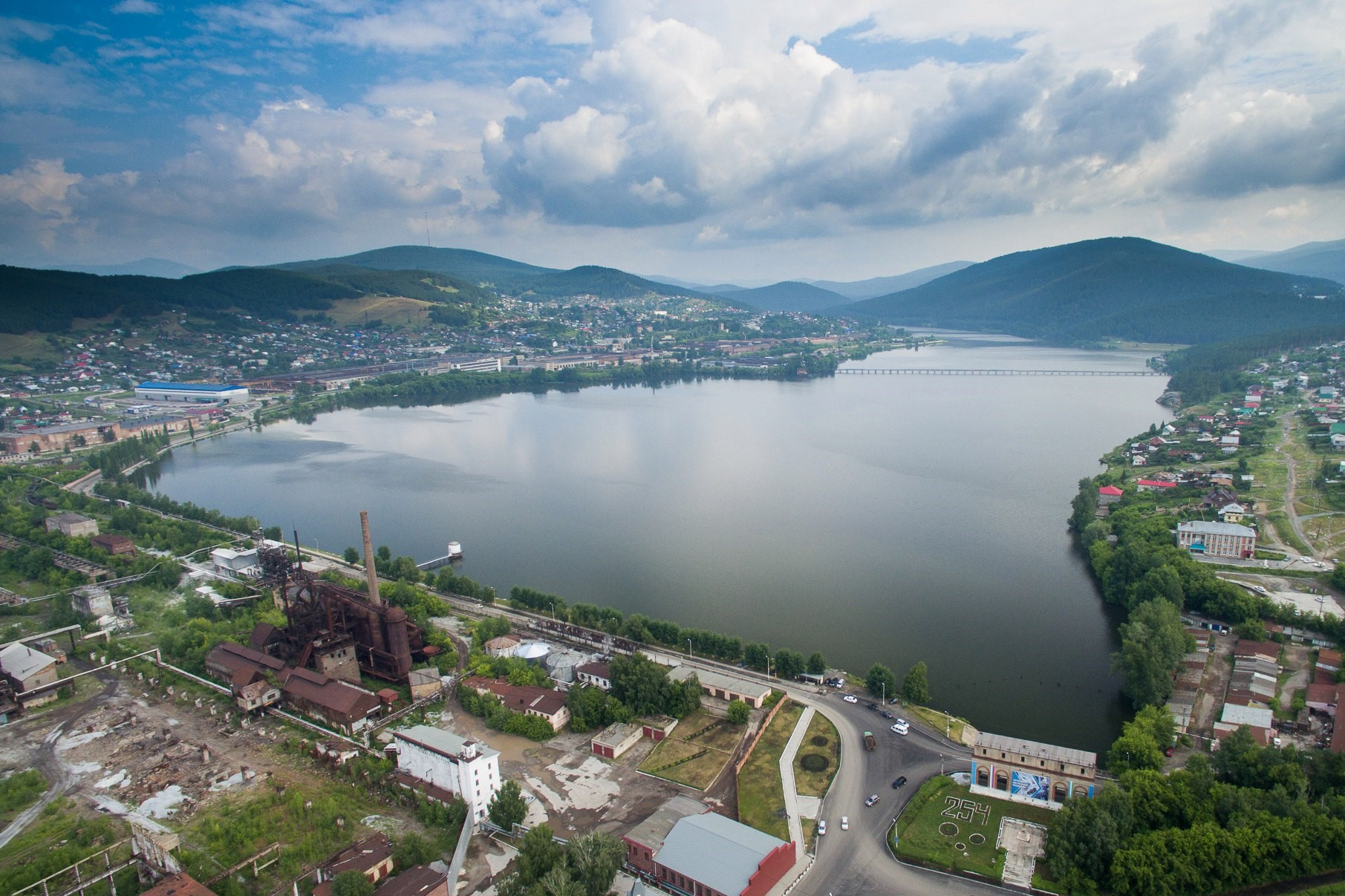 Белорецкое водохранилище